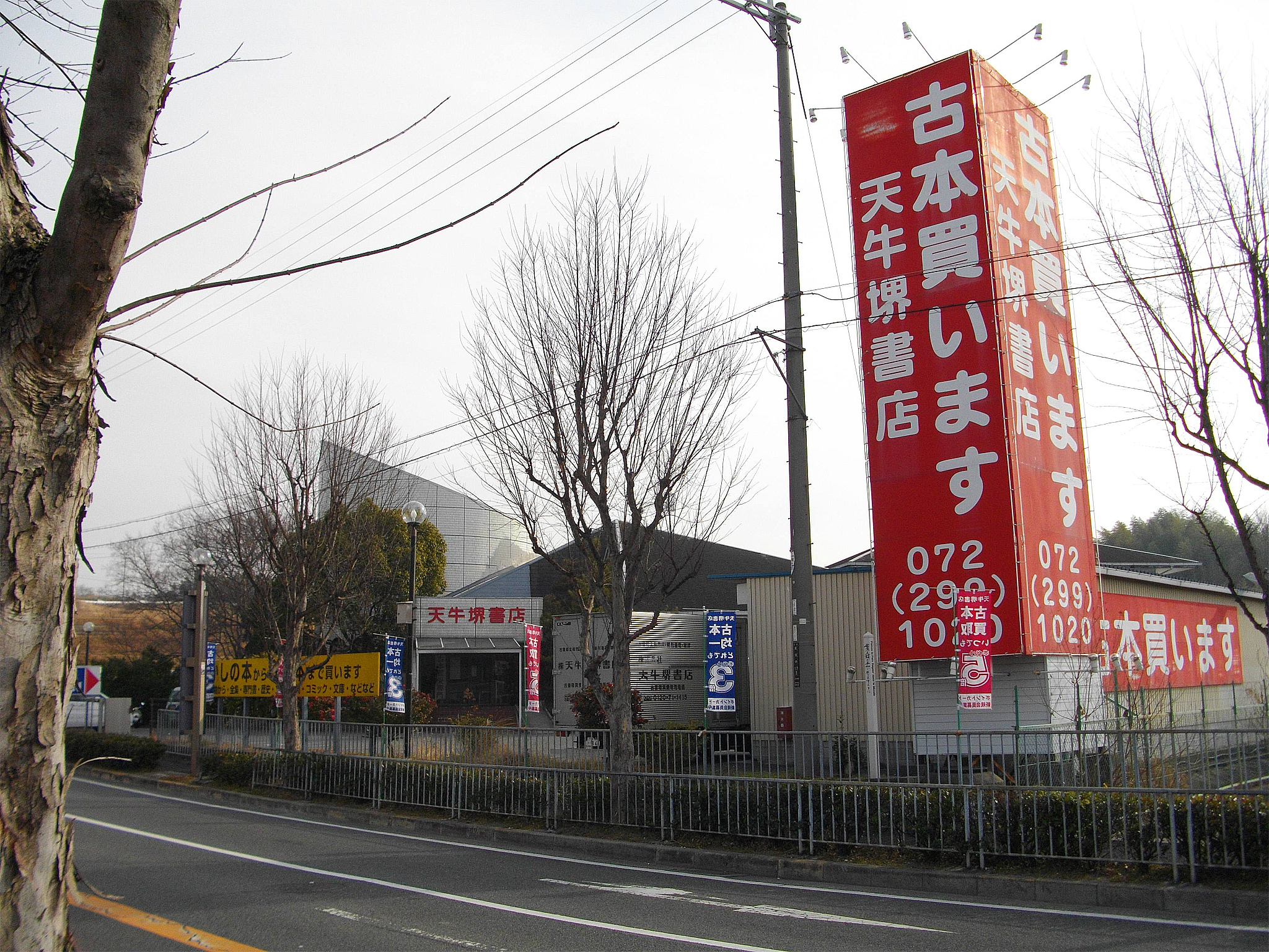 投稿者自身が『株式会社天牛堺書店本店』 （大阪府堺市南区泉田中17-2）を撮影。